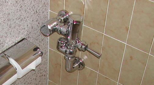 TOTO TV150